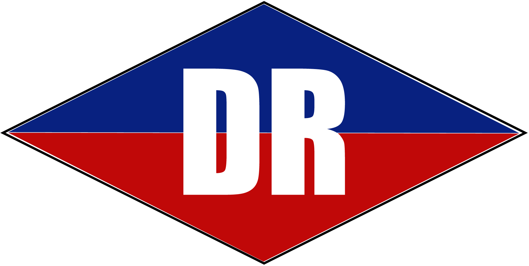 Emblema del partido político chileno Democracia Radical en 1971, utilizado en su propaganda para las elecciones municipales